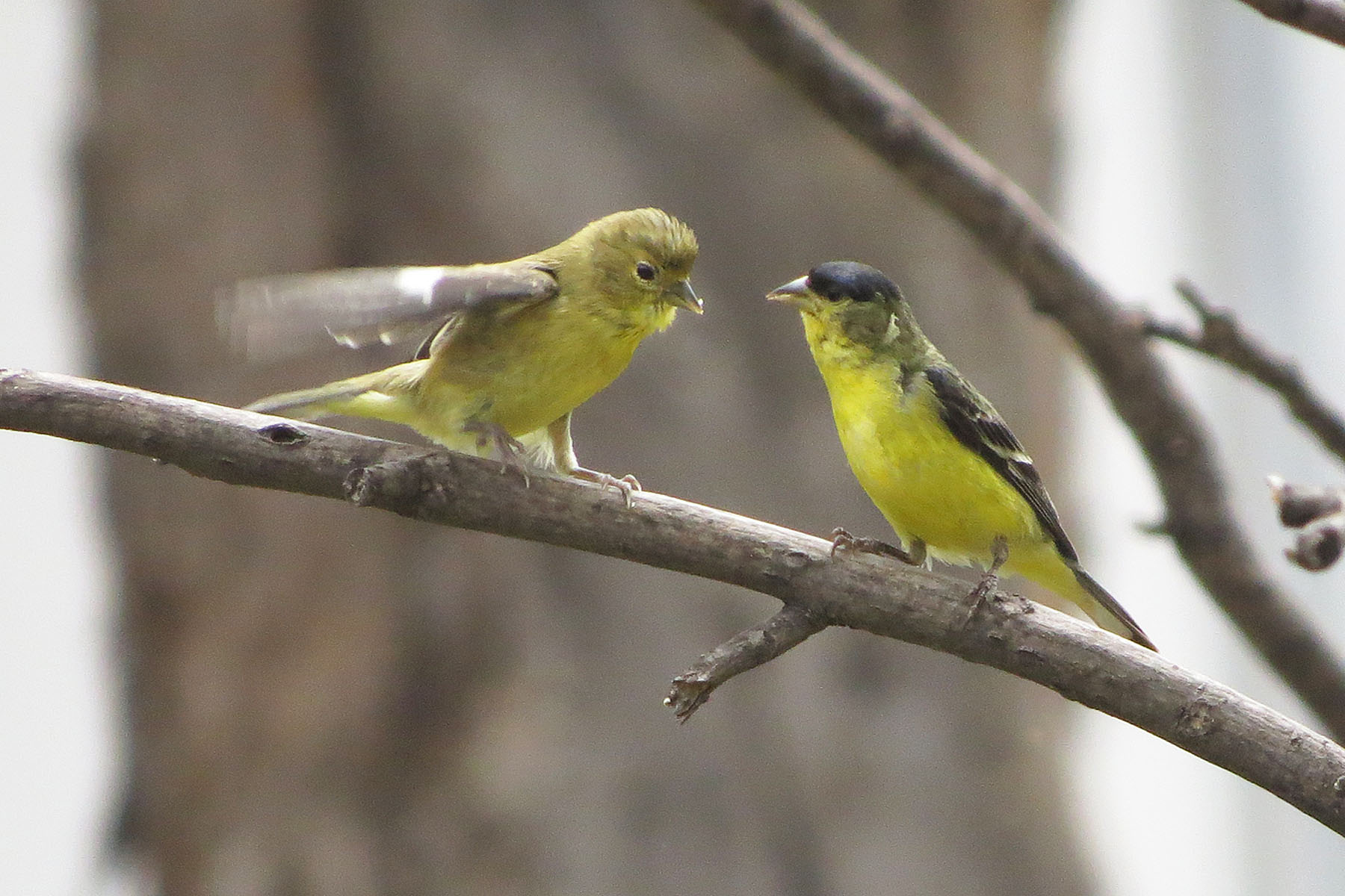 Spinus psaltria hesperophilus 14 may 15 Patagonia, AZ